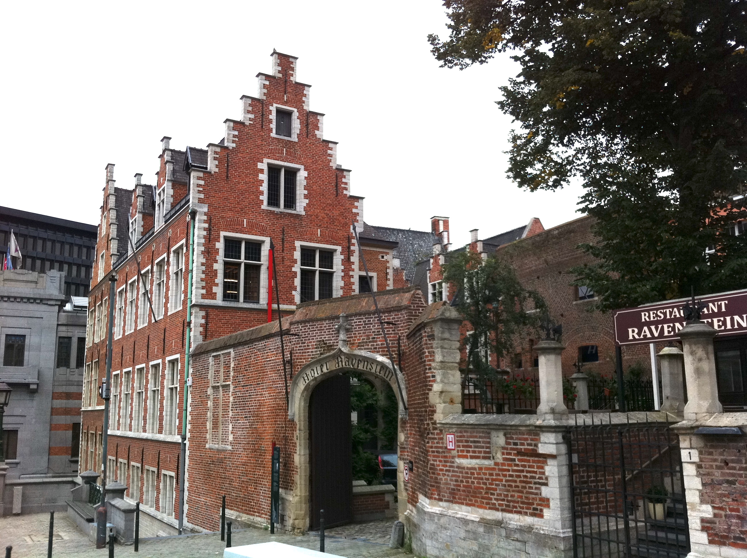 De Clèves-Ravensteinhuis - RAVENSTEINSTRAAT 1 - 3